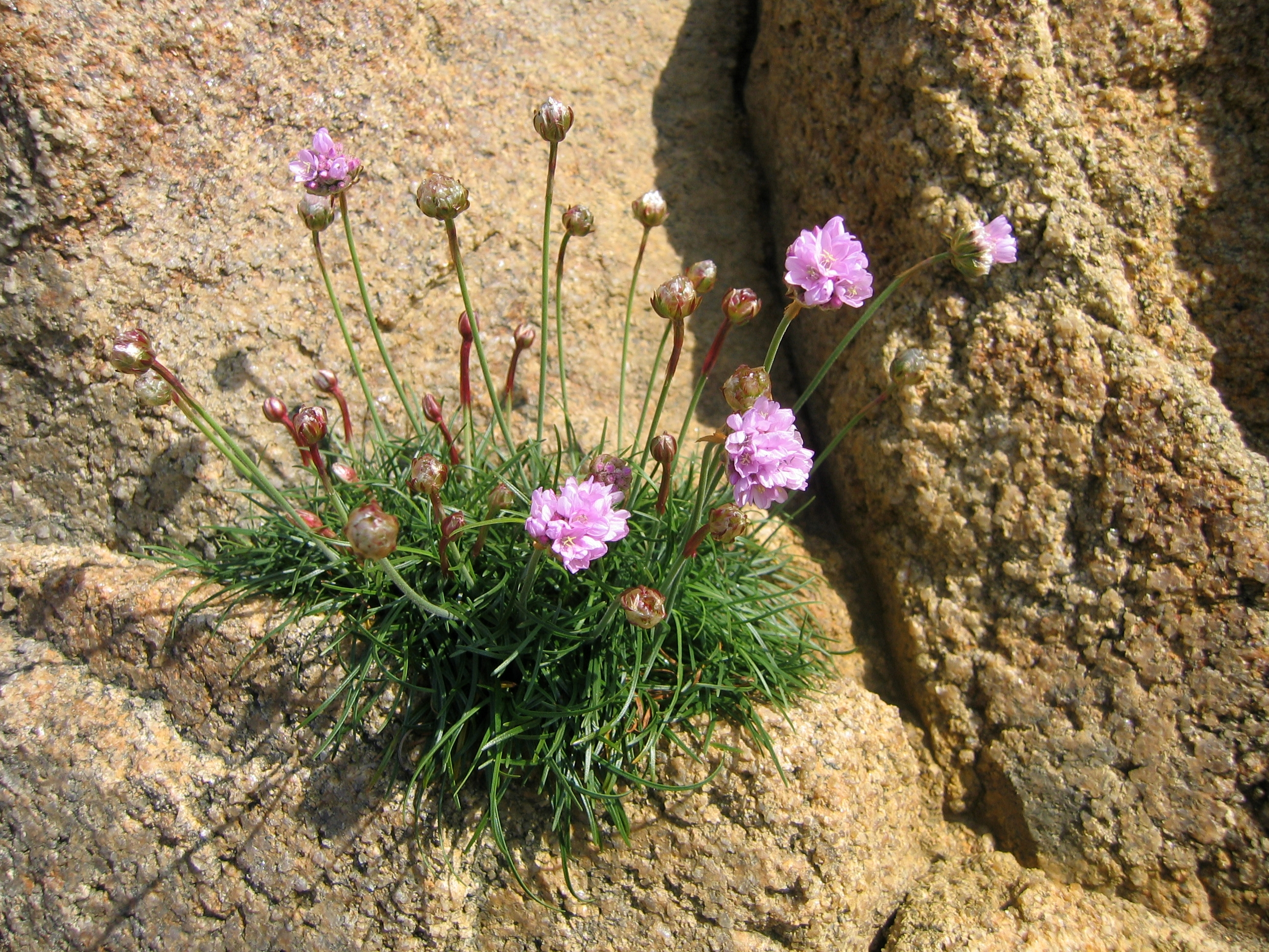 Armérie maritime à Carantec